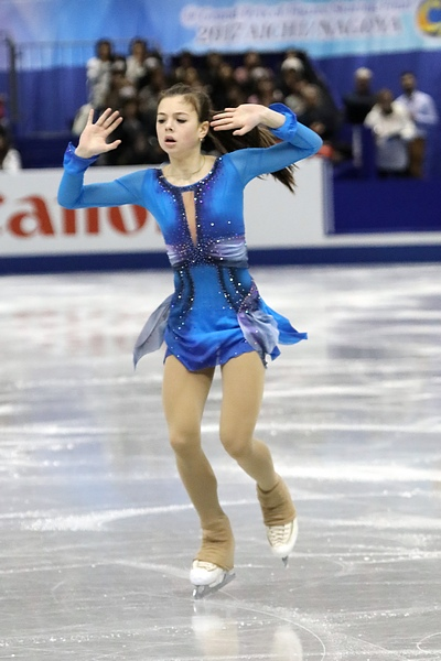 Анастасия Тараканова (Россия) на финале юниорского Гран-при 2017-2018